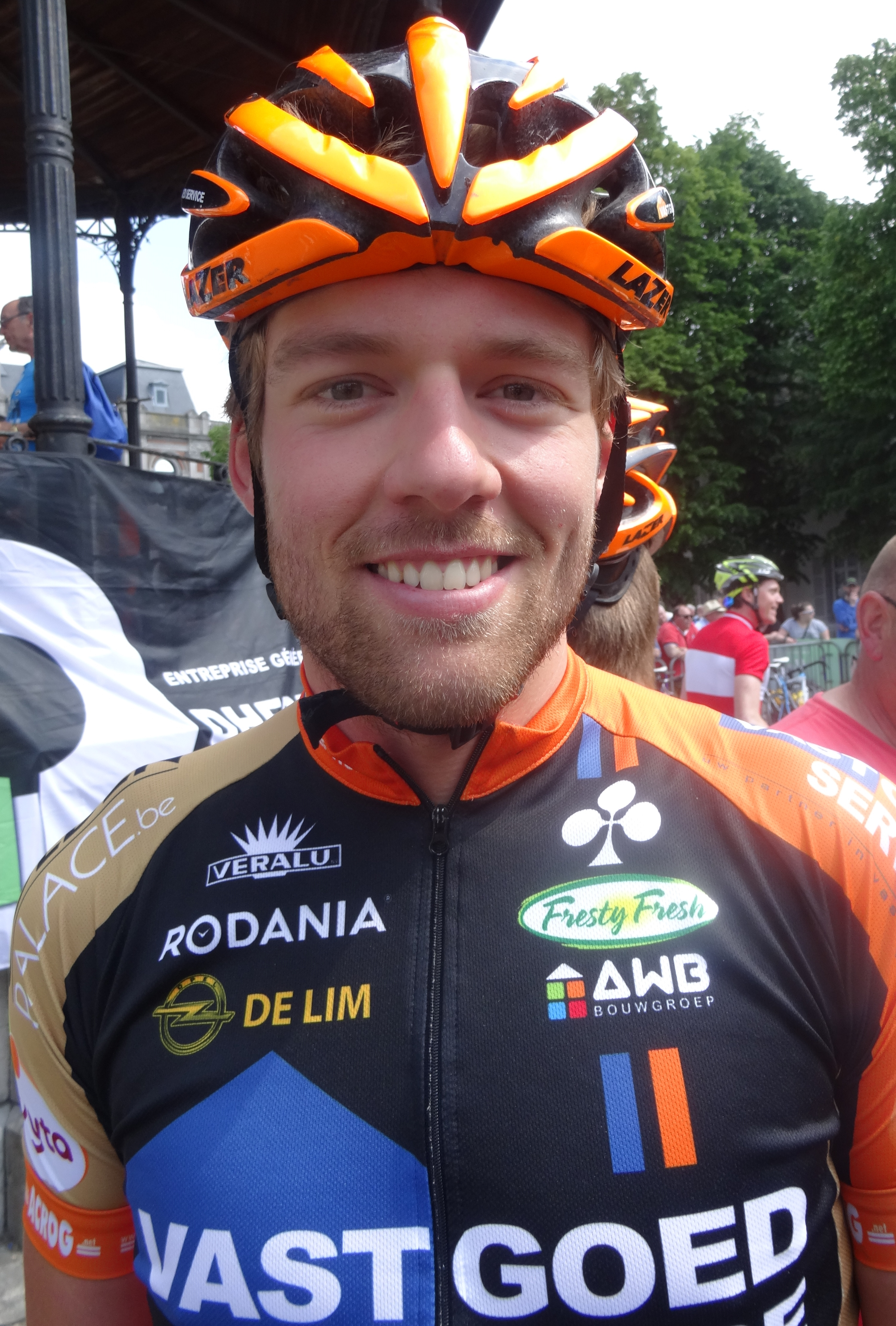 Reportage réalisé le samedi 17 mai à l'occasion du départ du Grand Prix Criquielion 2014 à Boussu, Belgique.